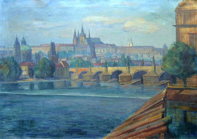 Karel Šimůnek - Hradčany